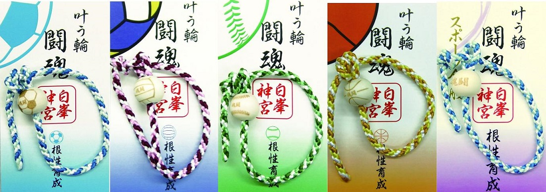 Kanauwa is Lucky charm of sports.